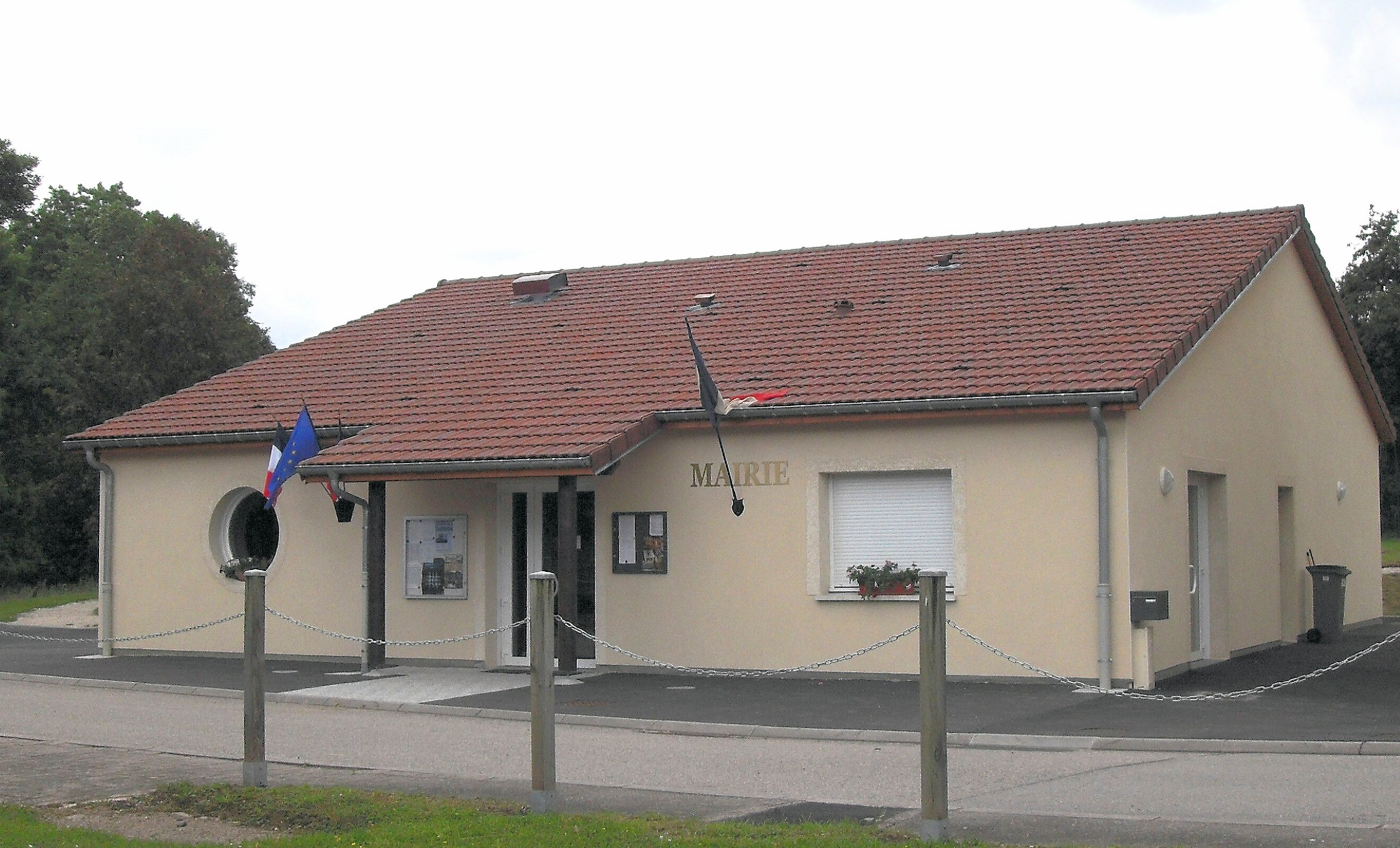 La mairie de Circourt